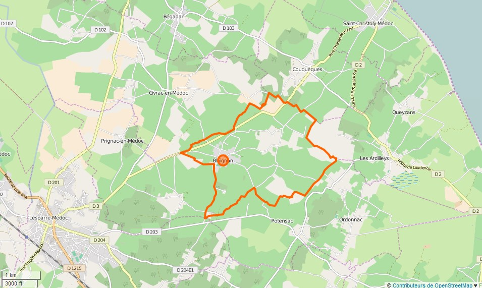 Blaignan Limite communale This map may be incomplete, and may contain errors. Don't rely solely on it for navigation.